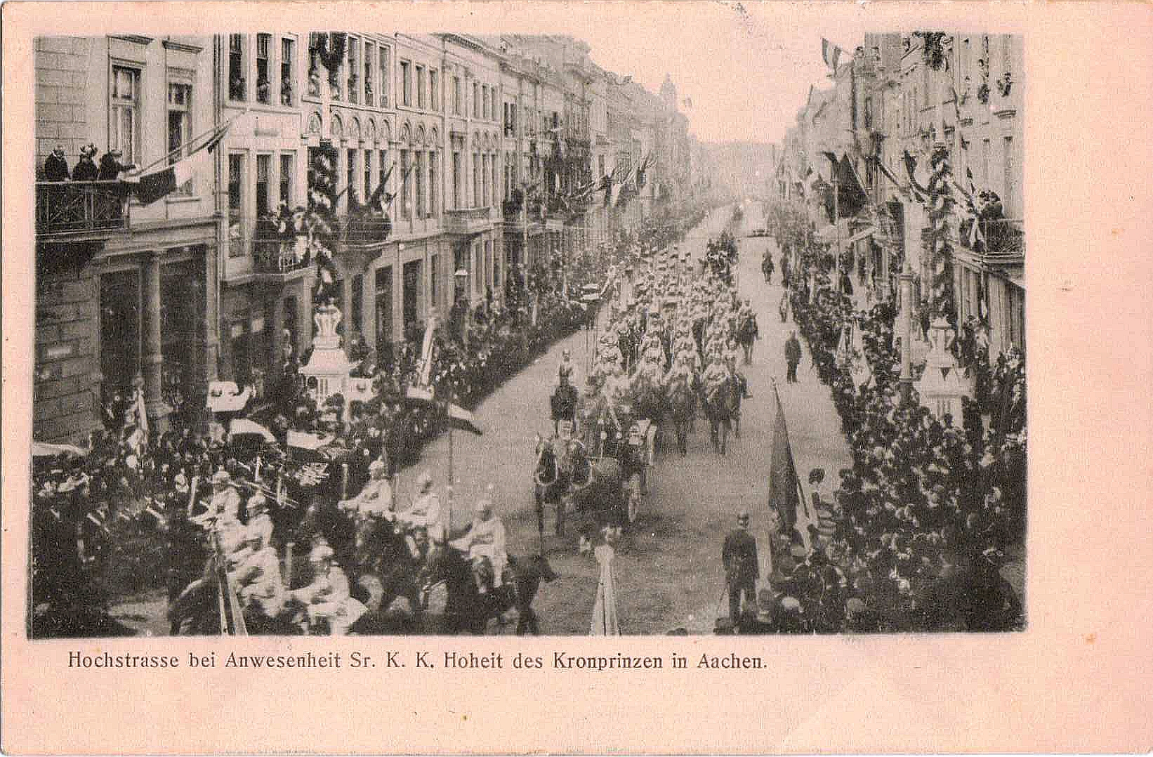 Parade auf der Theaterstraße anläßlich des Besuches von Kronprinz Wilhelm von Preußen (1902)